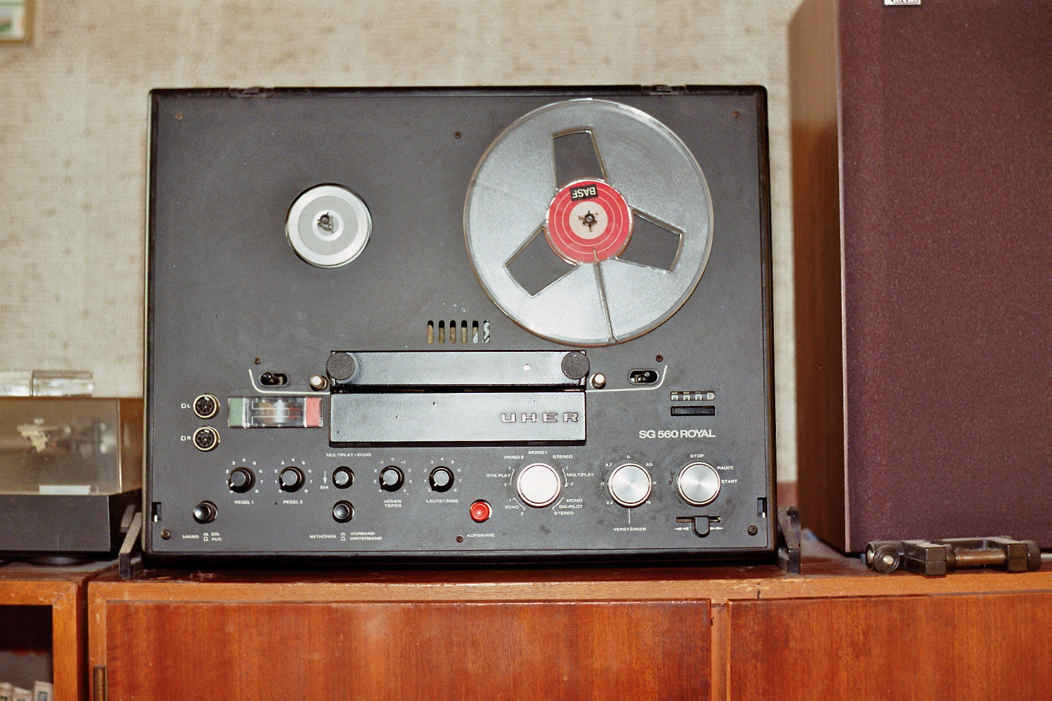 Uher Tonbandmaschine Typ SG560